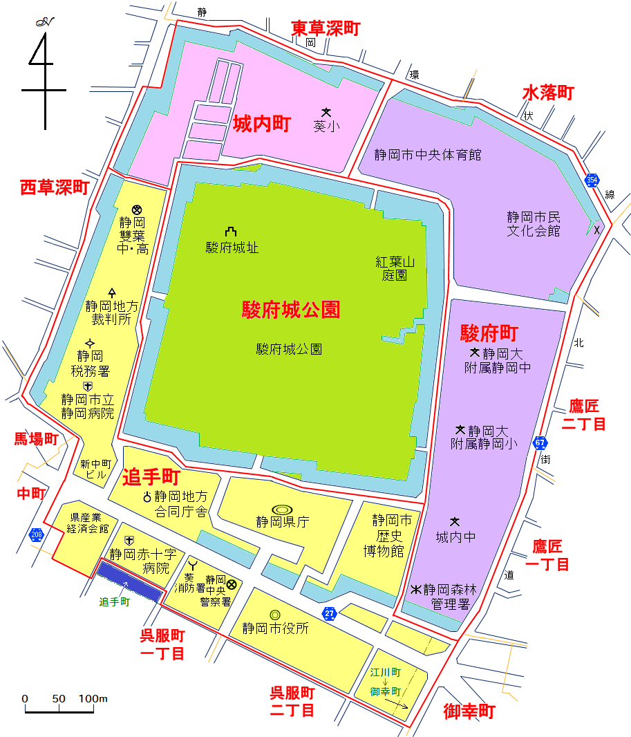 黄色の面・・・現在の追手町 青色の面・・・2014年以前の追手町で現在は呉服町一丁目となっている区域 御幸町に接している緑の一点鎖線の区域・・・1945年以前は江川町、1945年から1966年まで御幸町で、1966年に追手町となった区域 赤字・・・現在の町名 駿府城公園、駿府町、城内町は1966年までは追手町だった。 旧町名、町界は1932年発行「静岡市全図」を、現在の町界はウェブ地図サイト等を基に本人が作成。